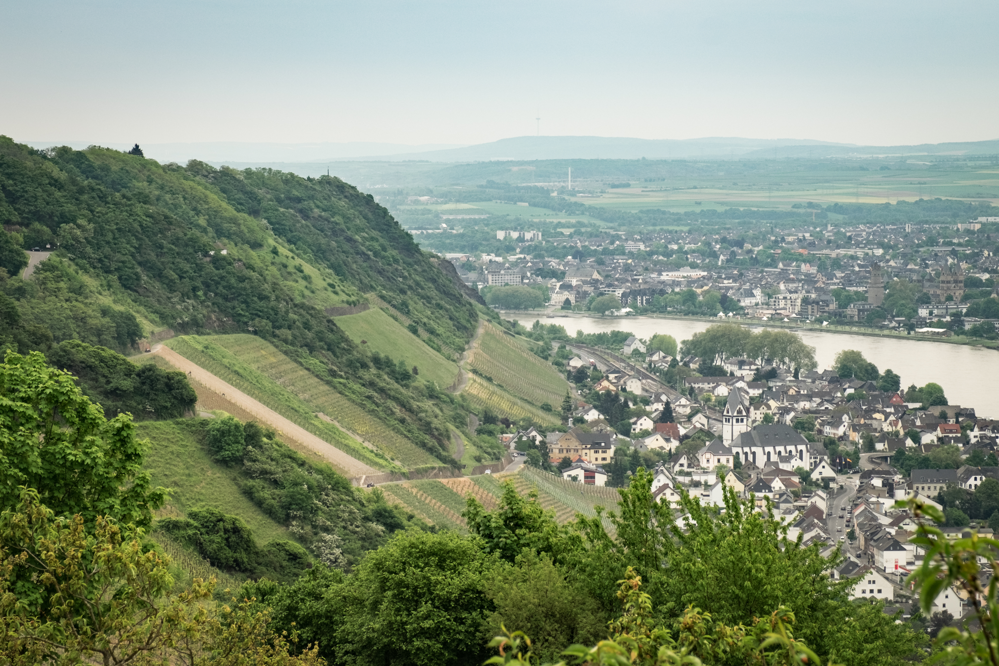 Blick auf den Langenbergskopf, welcher sich rechts im Bild befindet. Dort wo die kleine Hütte zwischen den Bäumen zu sehen ist.